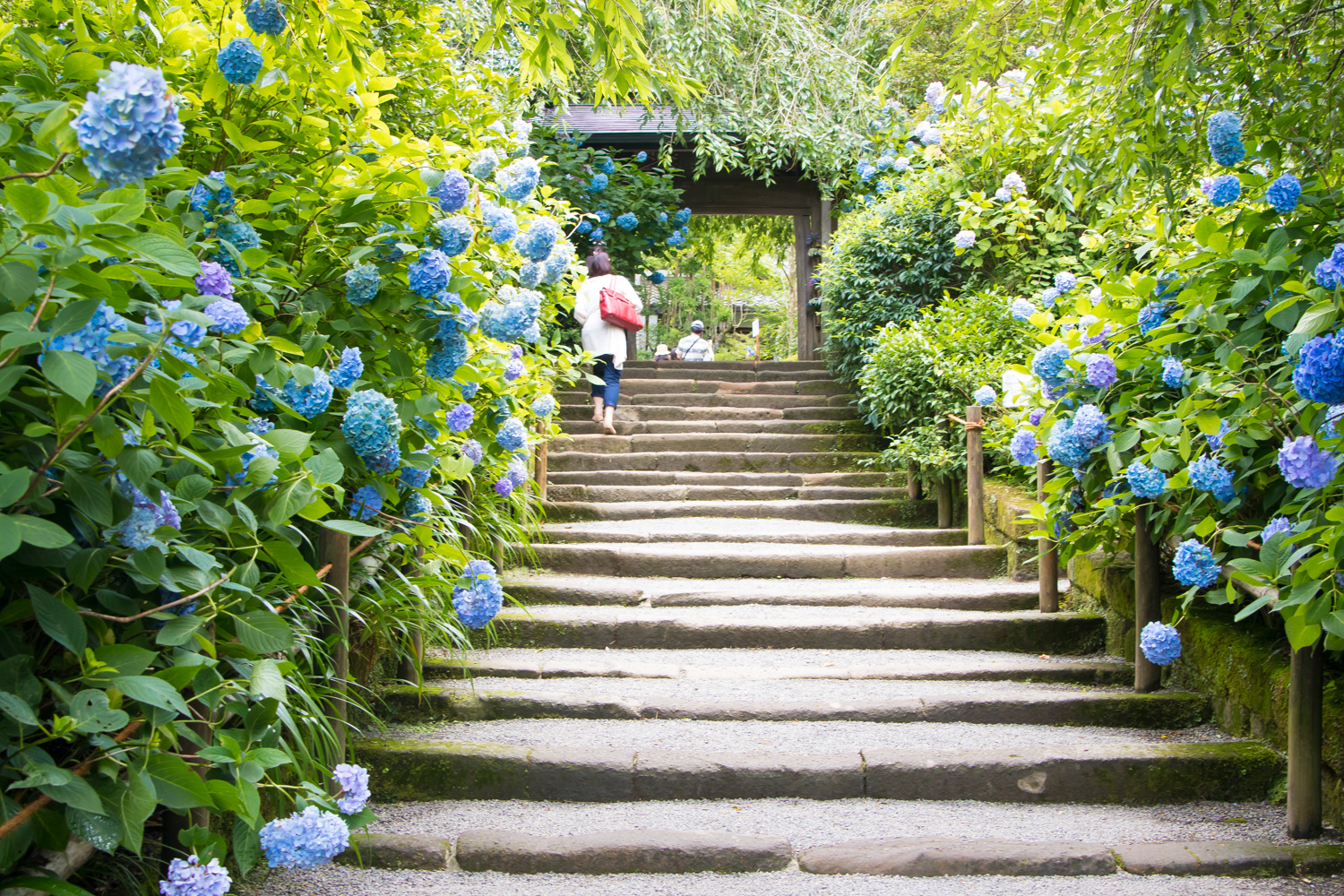 明月院（あじさい寺）、山門への階段。